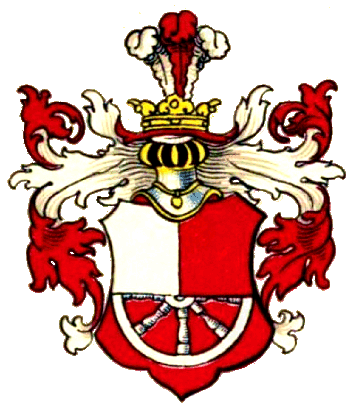 Stammwappen der Chotek de Chotkova ([Grafen] Chotek von Chotkova)